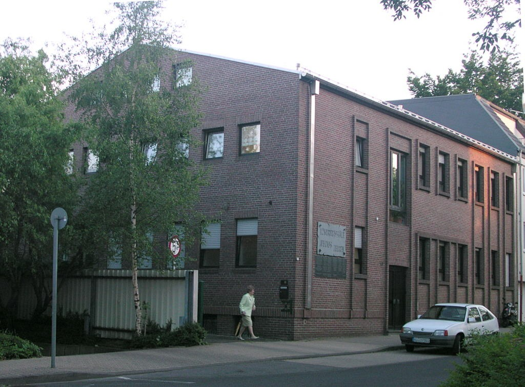 Aachen, Königreichsäle der Zeugen Jehovas